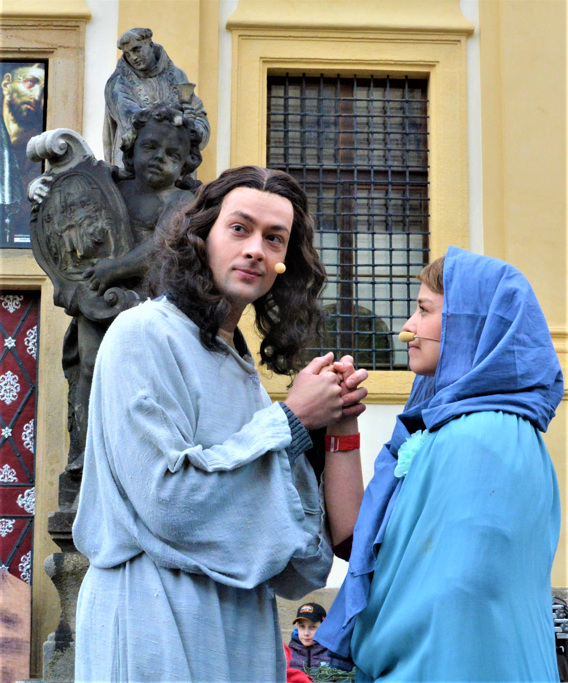 Radúz Mácha, jako Ježíš Nazaretský a Pavla Beretová, jako Maria v představení lidové Pašijové hry